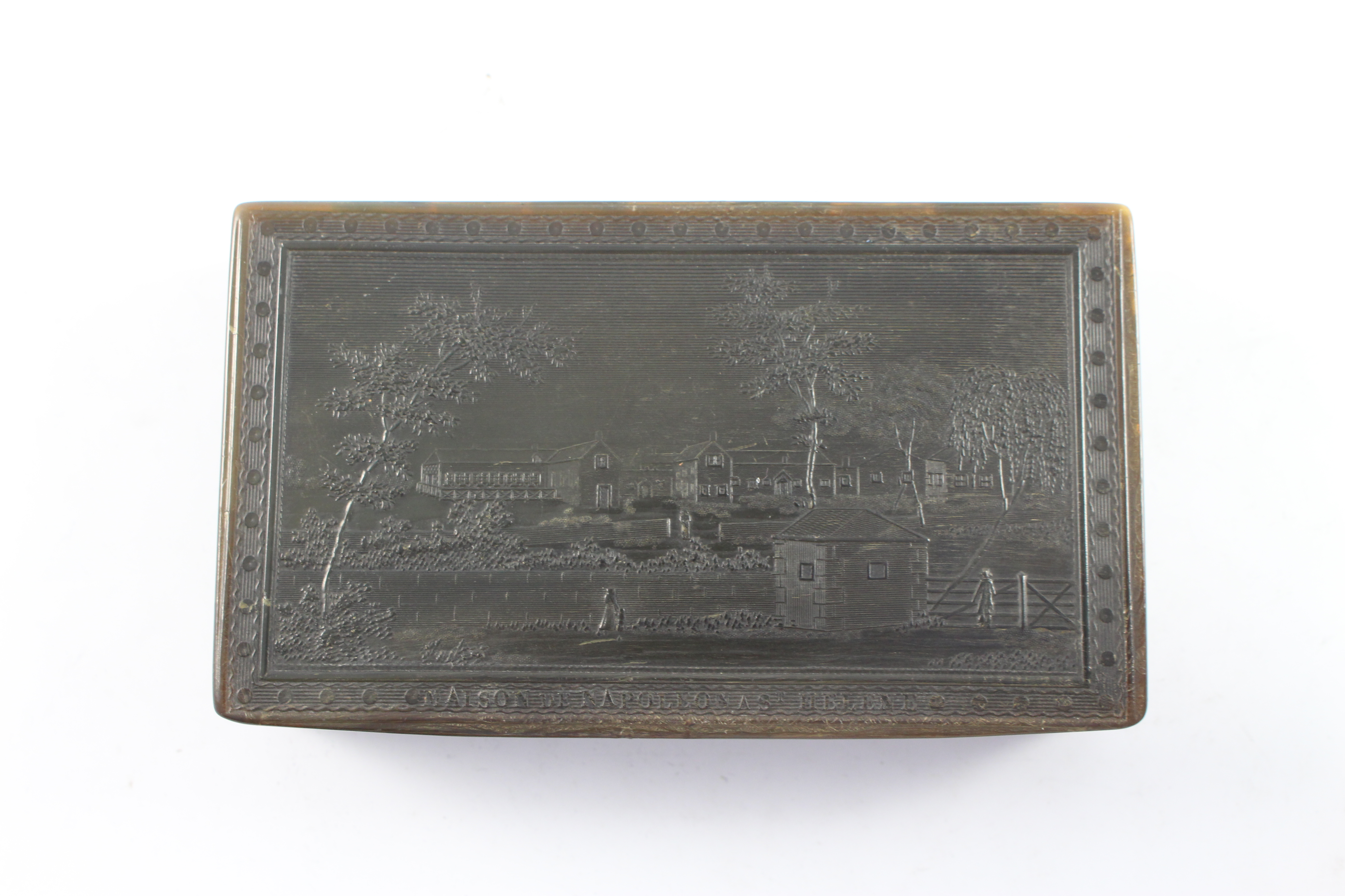 Tabatière représentant la maison de Napoléon à Ste Hélène ; Propriété du Musée des Hospices civils de Lyon - Propriété Musée de France INV :2007.0.1841.M 696